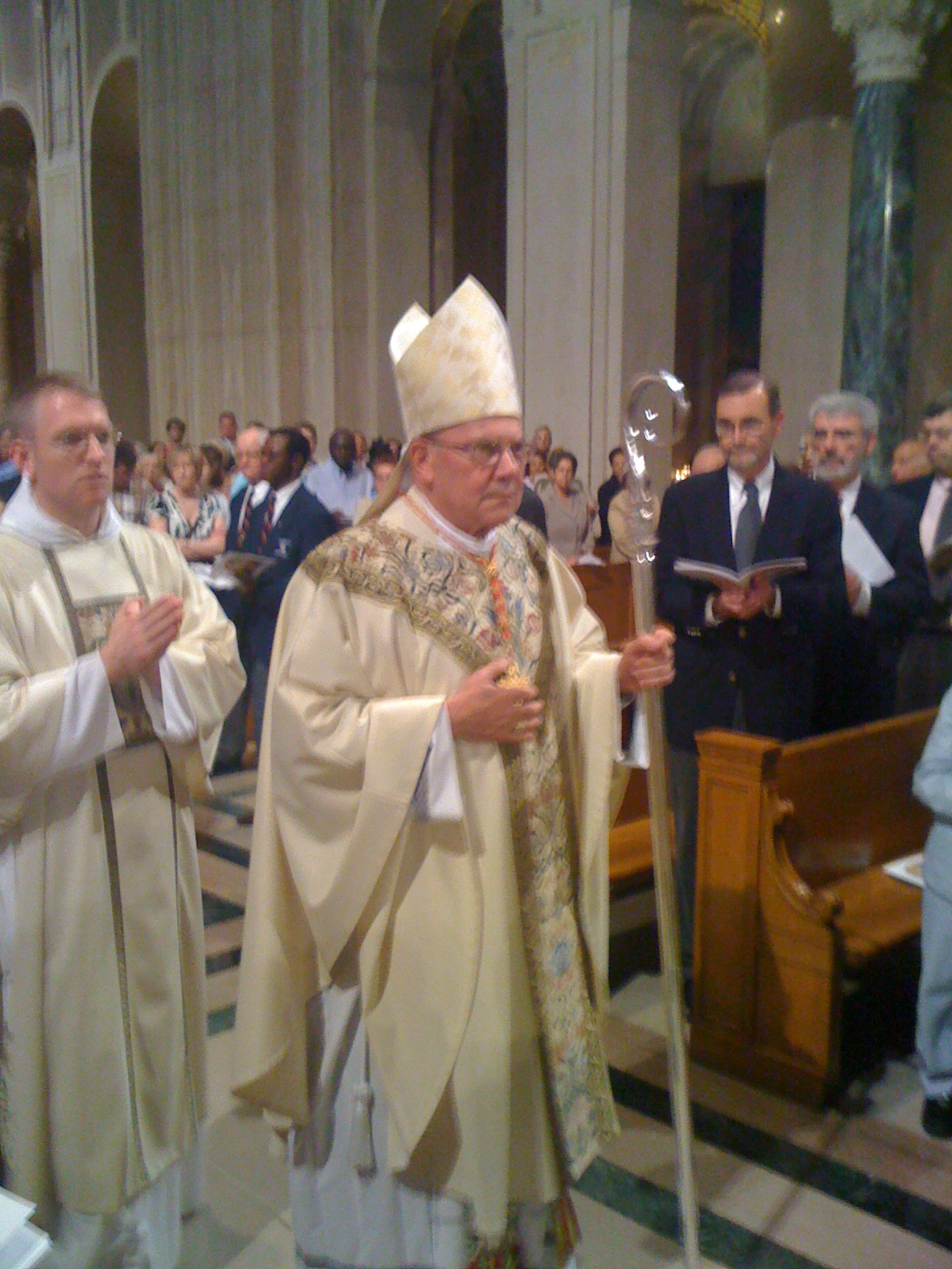 Cardinal William Levada